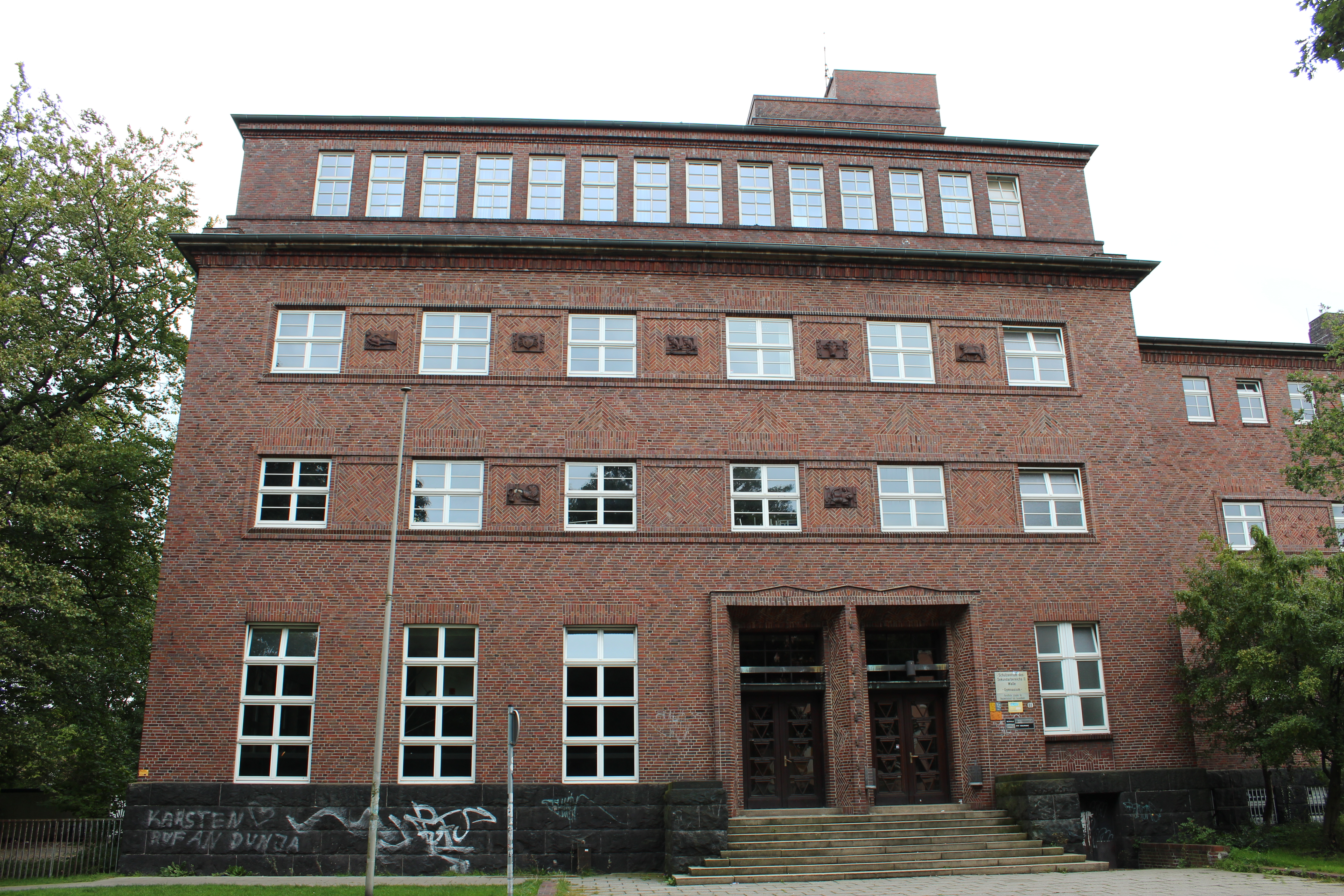 Lyzeum Lange Reihe in Bremen, Lange Reihe 81.Das abgebildete Objekt ist ein geschütztes Kulturdenkmal in der Freien Hansestadt Bremen, mit der Nr. 0838 beim Landesamt für Denkmalpflege registriert.